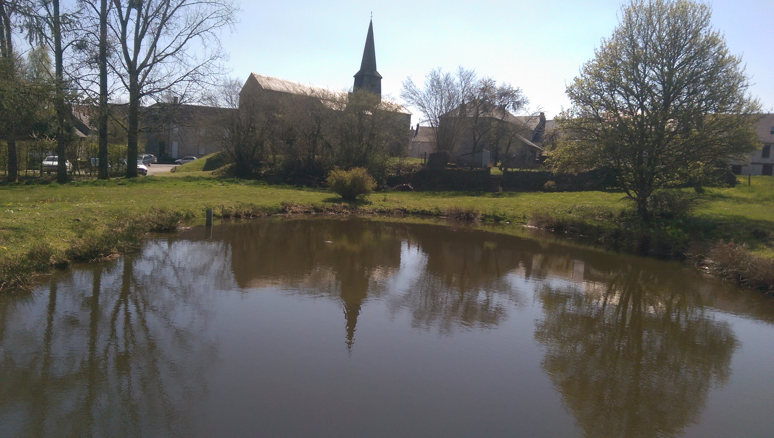 L'église